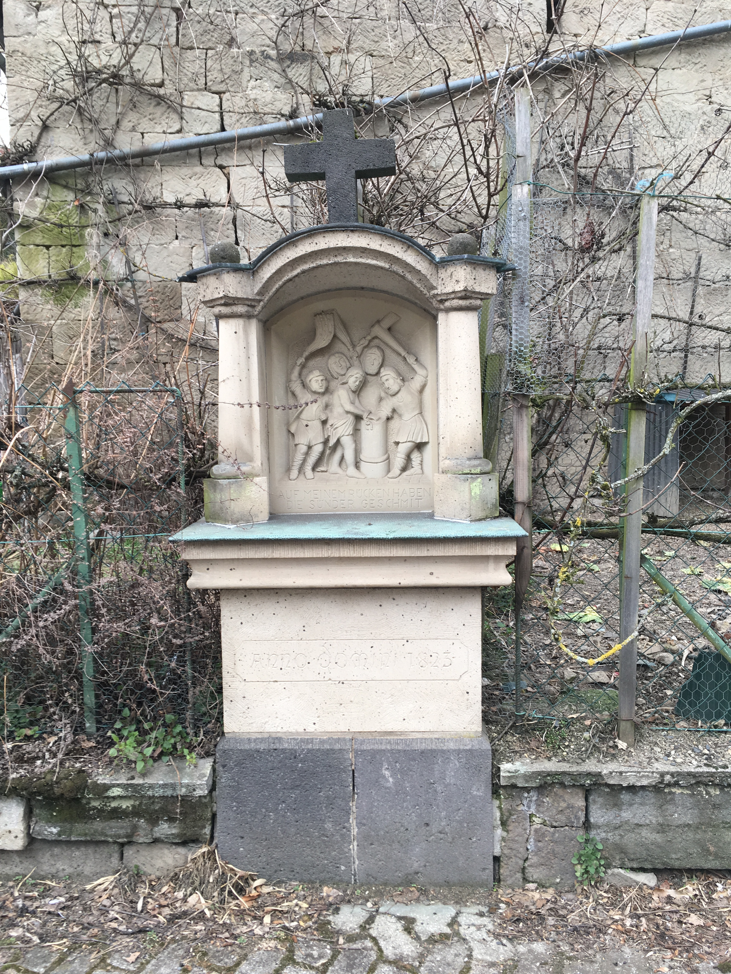 Kreuzwegstation in Rieden, Eifel